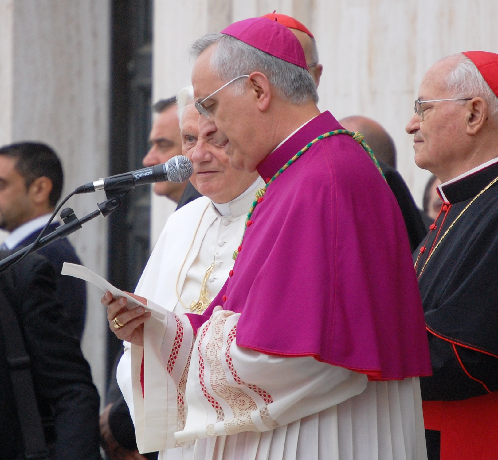 San Giovanni Rotondo. 21 giugno 2009. Visita Pastorale di Sua Santità Benedetto XVI Discorso di Mos. Domenico D'Ambrosio sul Sagrato della Chiesa di Santa Maria delle Grazie. Foto Marcello Castigliego